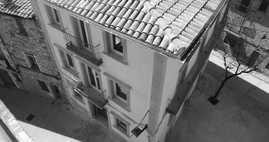 Casa de les joies situada al carrer de les joies Nº 33 al costat de l'Ajuntament.